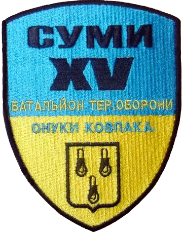 Нарукавний шеврон 15-го батальйону ТрО ЗСУ «Суми» Сумської області.